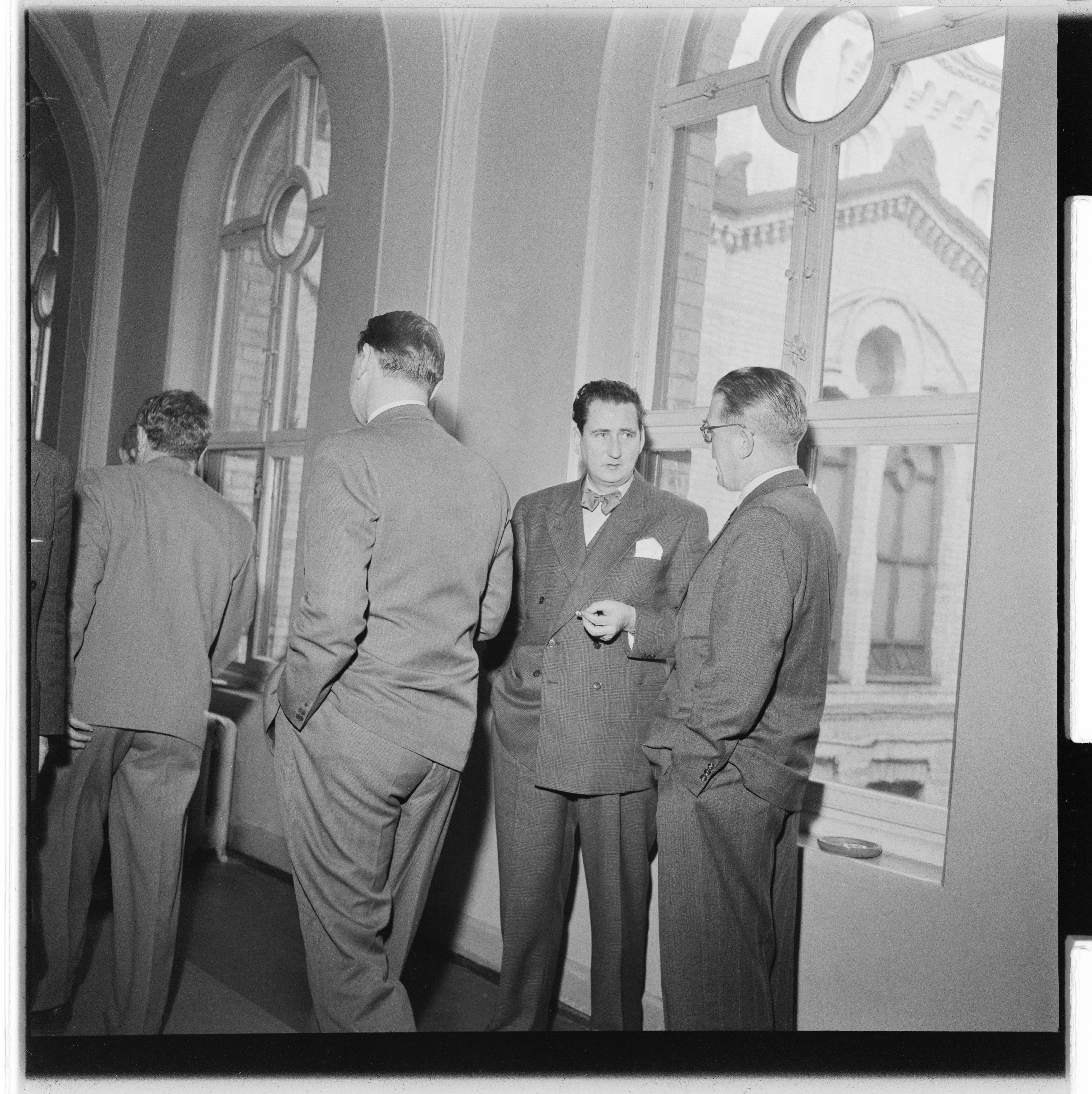 Bildet er hentet fra Arkivverket. Stortinget 1954. NÅ nr. 3, 1954. Arkivinstitusjon : Riksarkivet Arkivnavn : Billedbladet NÅ Sted : Norge, Oslo, Oslo, Stortinget Emneord: Stortinget, Menn Avbildet